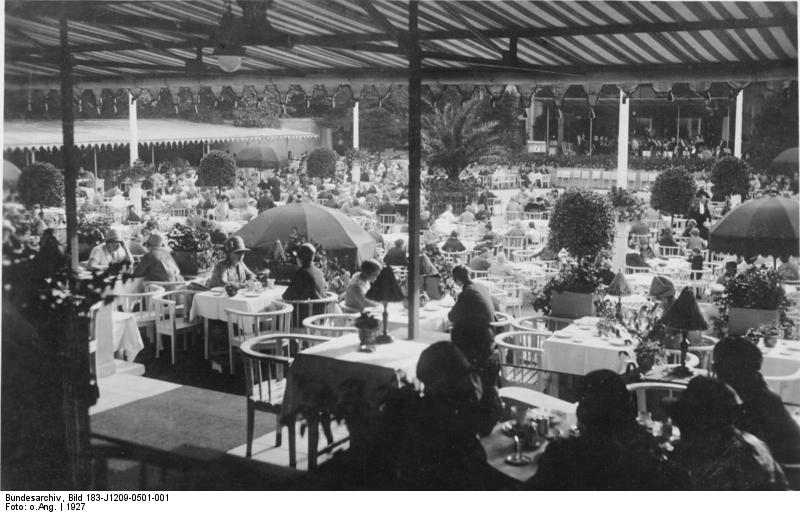 Berlin, Krollgarten Scherl: Berlin; Platz der Republik UBz.,: den Krollgarten; 1927